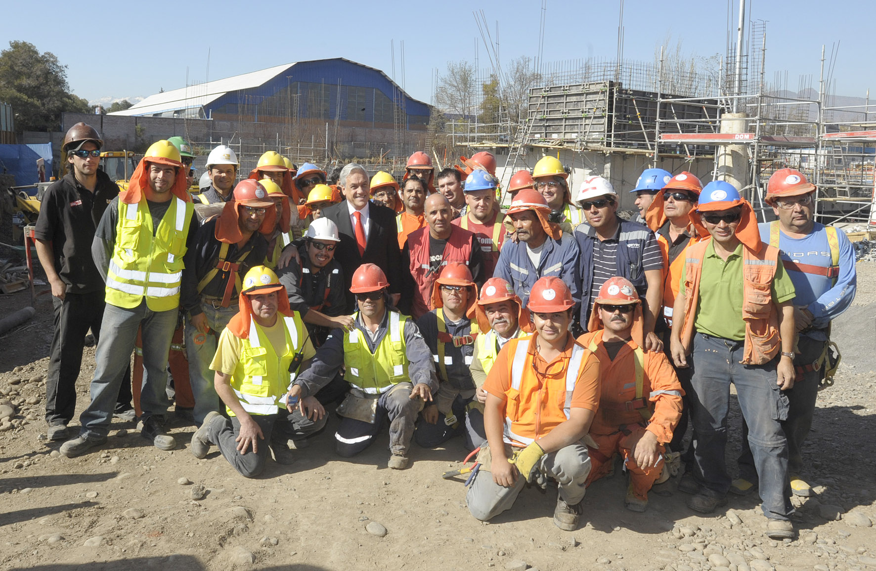 Visita inspectiva del presidente Sebastián Piñera a las obras de construcción del nuevo teatro de Rancagua.